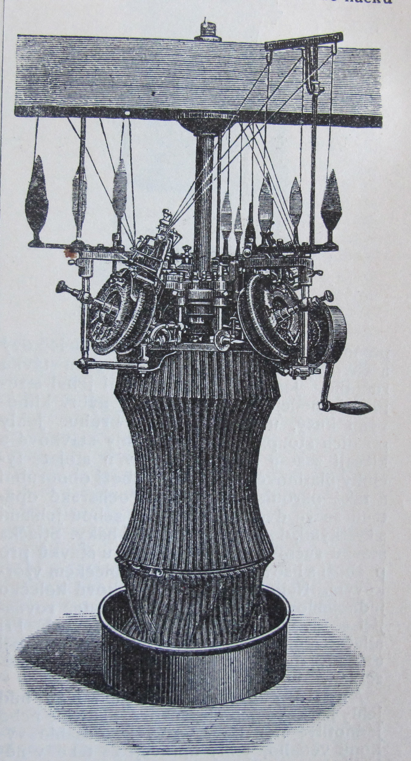 Původní popisek: Č. 3184. Okrouhlý stávek pytlenový.